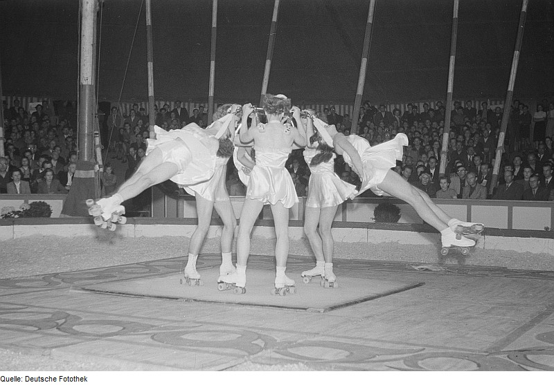 Original image description from the Deutsche Fotothek Zirkusdarbietung von Artisten auf Rollschuhen